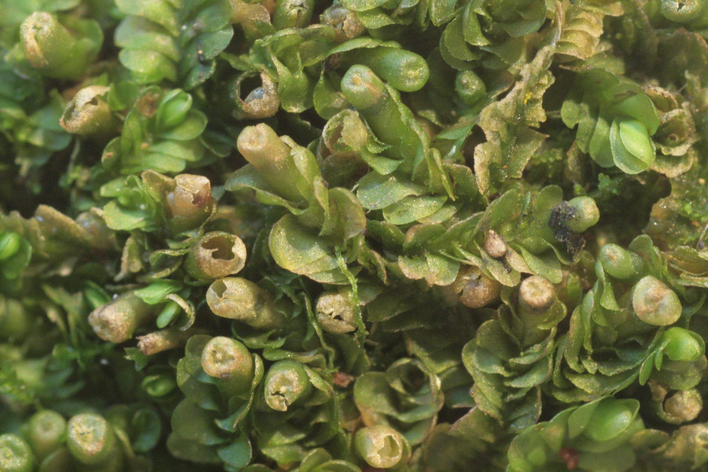 Glattkelchiges Jungermannmoos (Jungermannia leiantha)